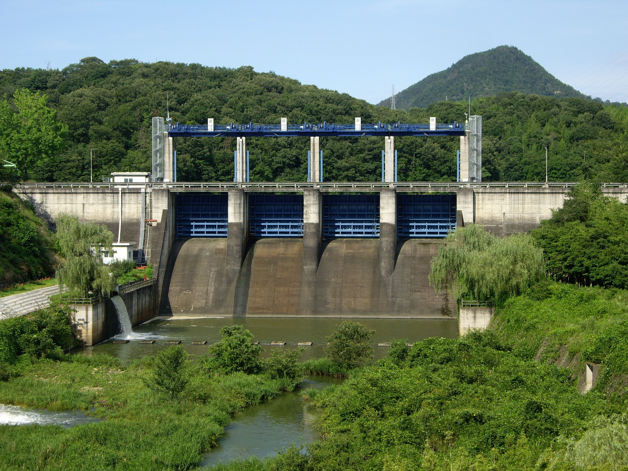 府中ダム（府中湖） - 香川県坂出市府中町